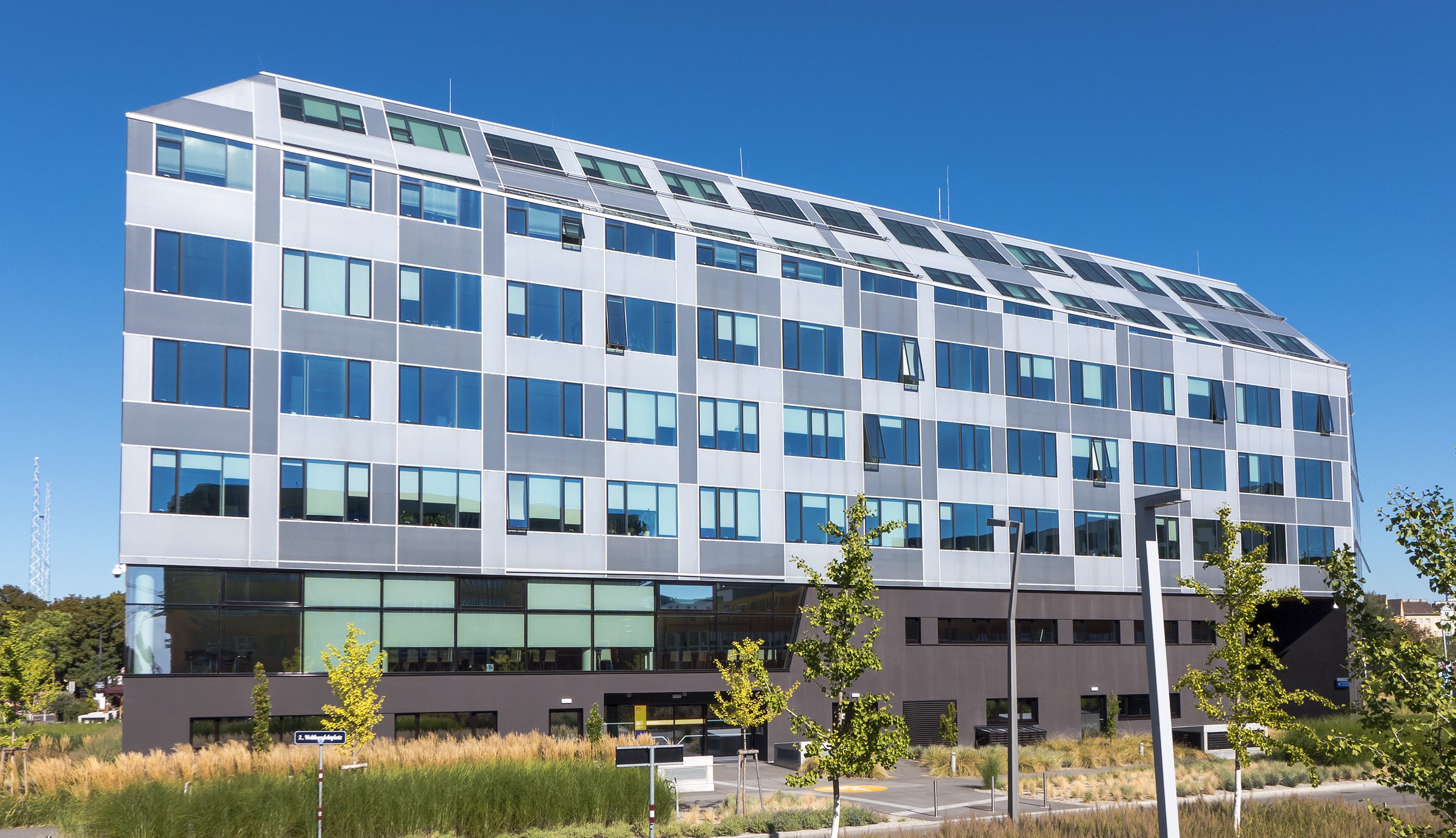 Vienna Institute of Demography in Wien 2